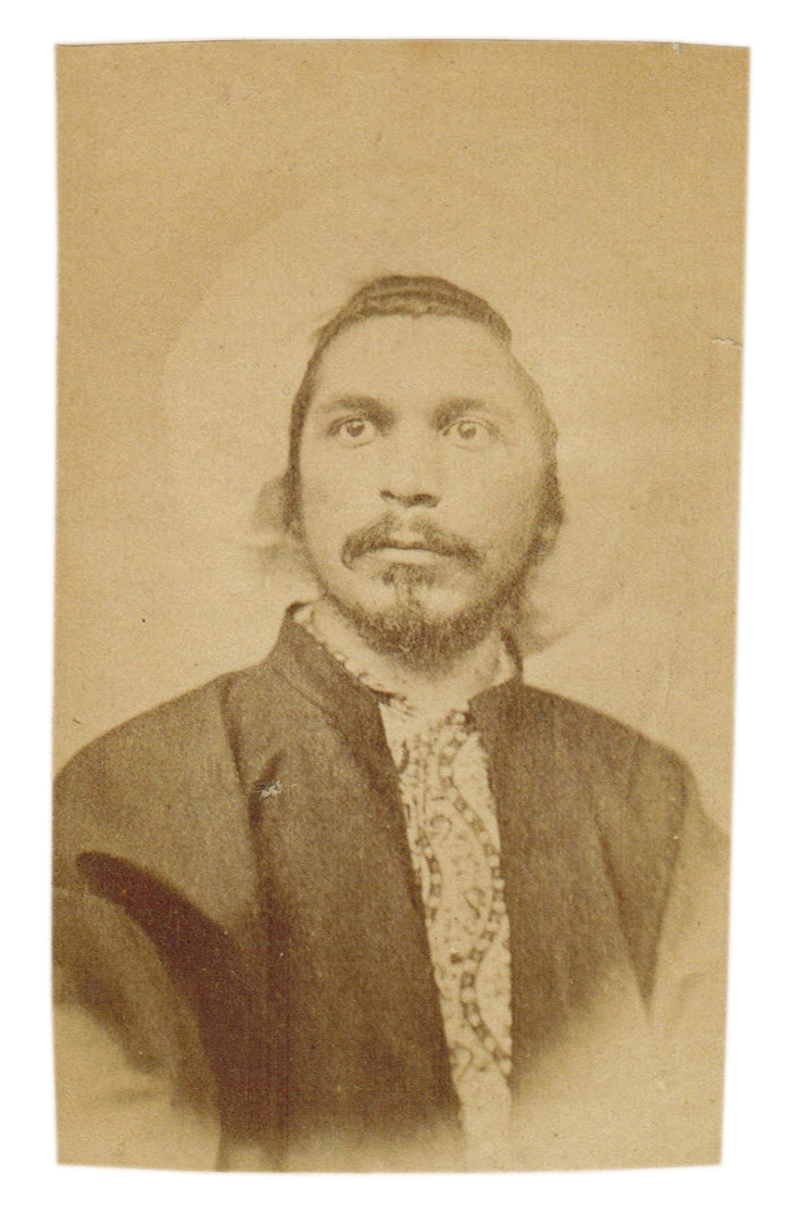 Ali Suavi, 2. Abdülhamid'i devirmek isteyen erken dönem Osmanlı aydınlarından.